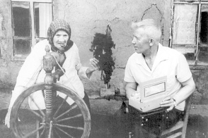 Чувашев Михаил Иванович